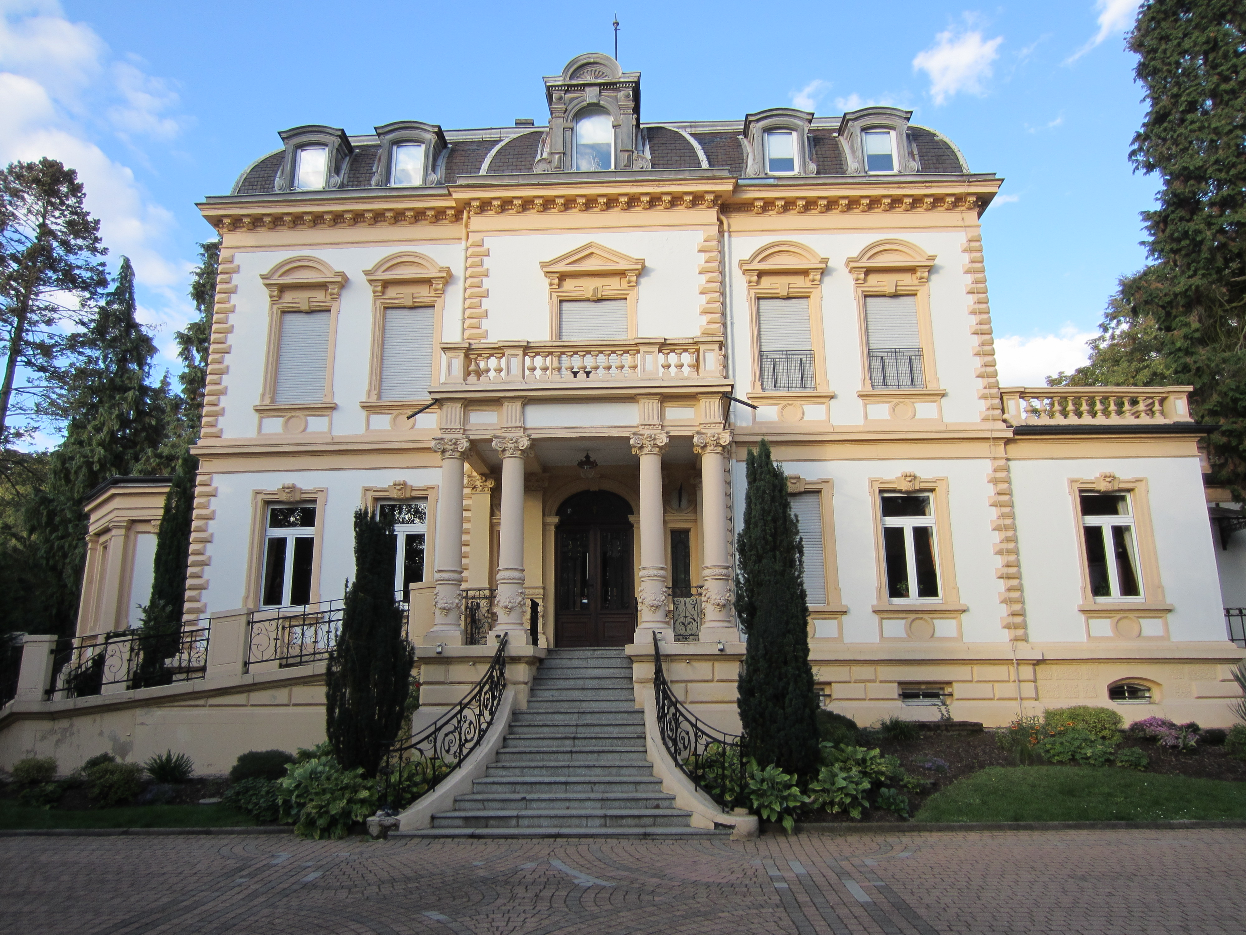 Description Maison du directeur des hauts-fourneaux de la Paix à Nilvange Date19 September 2011Sourcemon appareil photoAuthorAimelaimePermission(Reusing this file) . Maison du directeur des hauts-fourneaux de la Paix à Nilvange